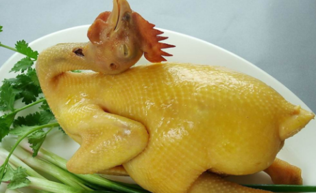 Một con gà luộc.